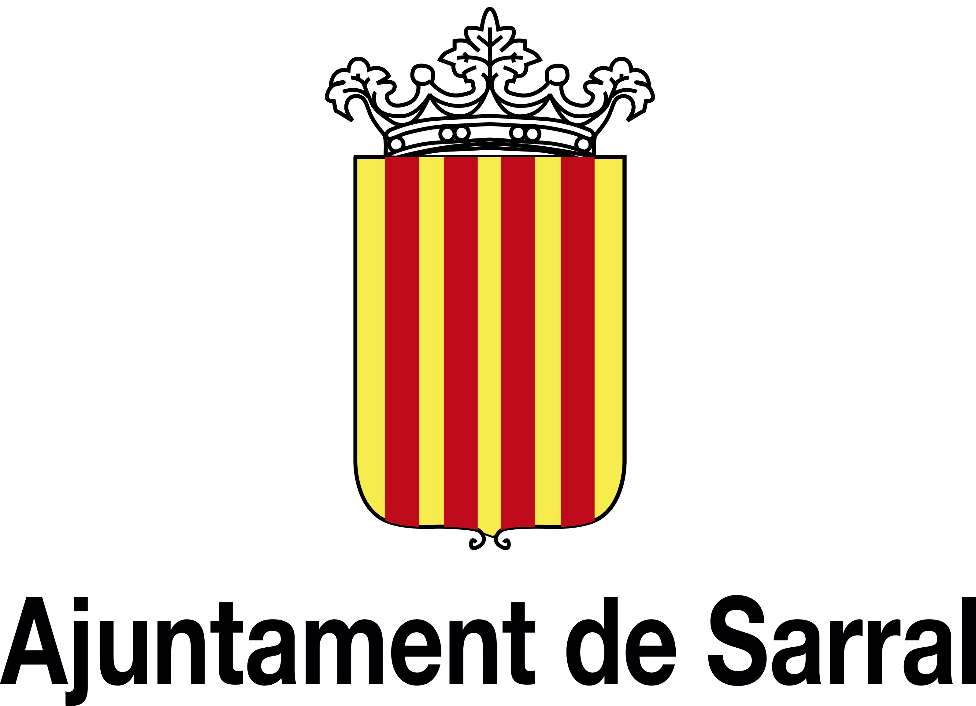 Escut oficial de Sarral